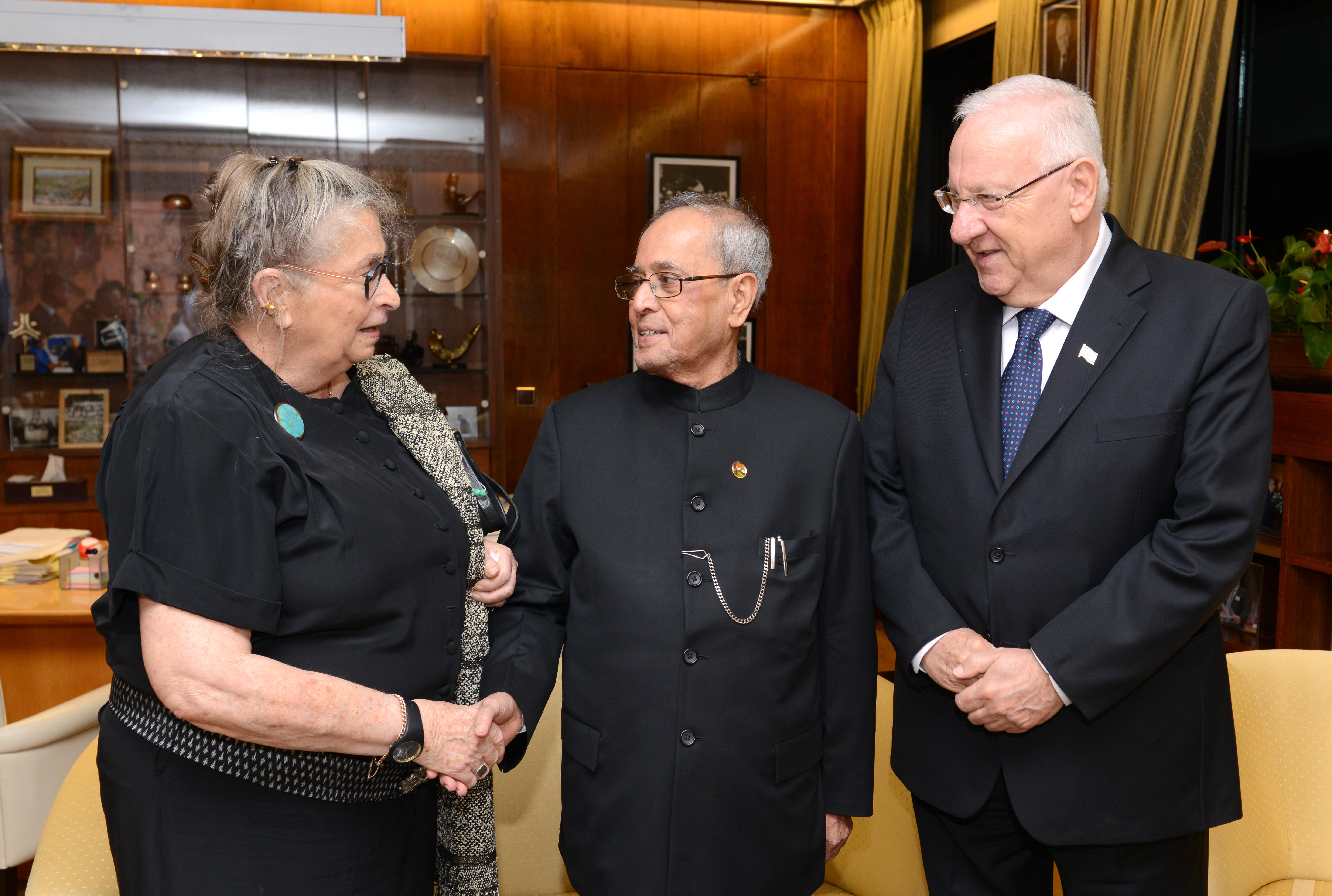 נשיא הרפובליקה של הודו פרנב מוקהרג'י בעת ביקורו בישראל עם נשיא מדינת ישראל ראובן ריבלין